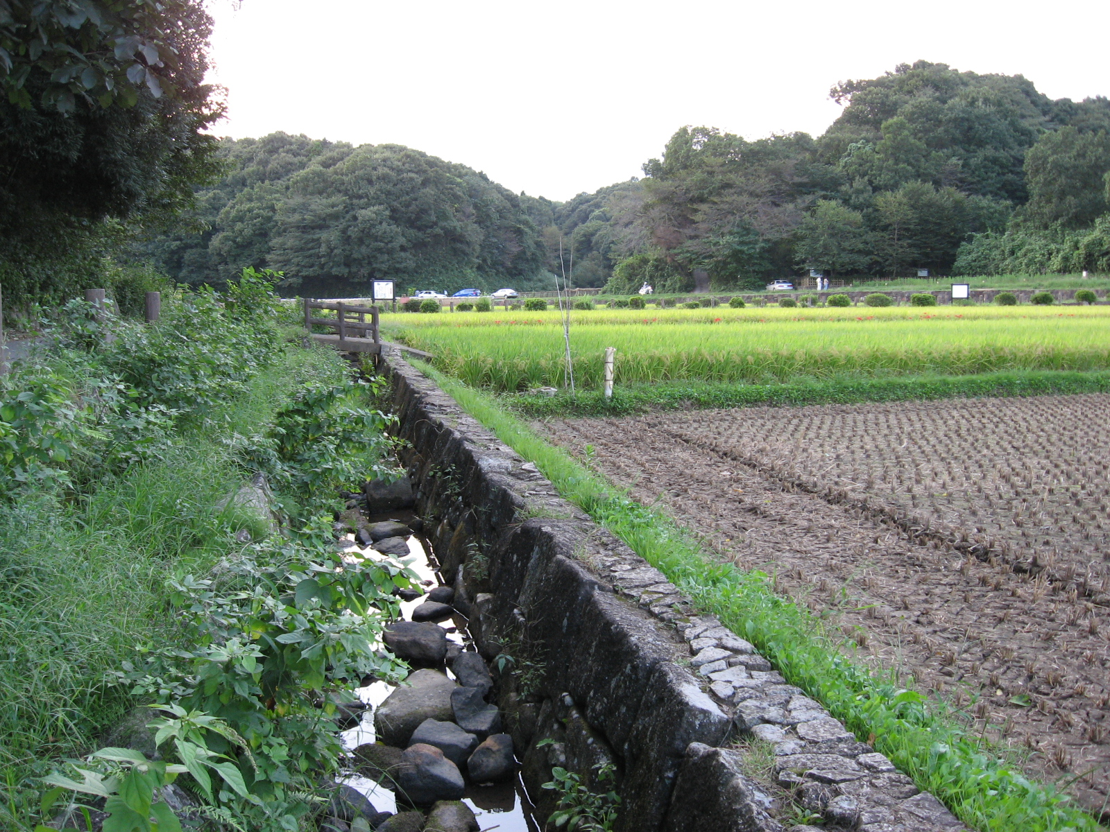 寺家ふるさと村を流れる寺家川